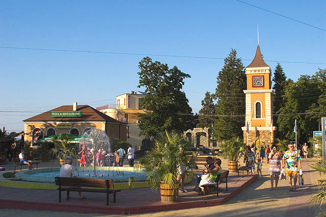 Площадът на град Обзор